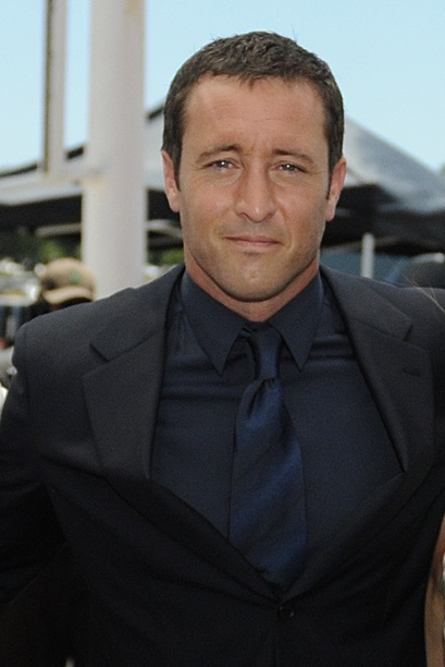 Alex O'Loughlin en 2013